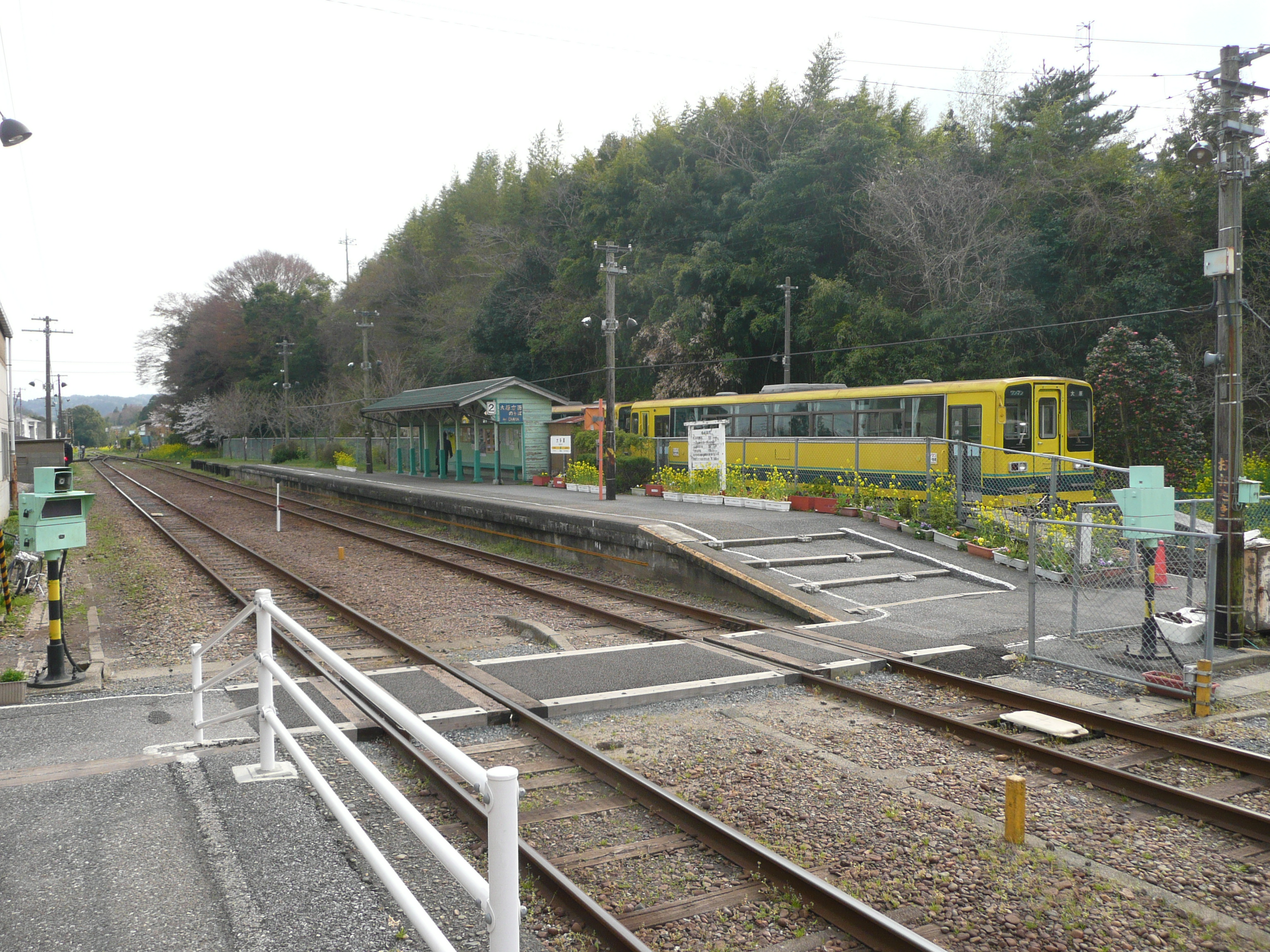 Ōtaki Station, Ōtaki, Chiba, Japan Platform 2